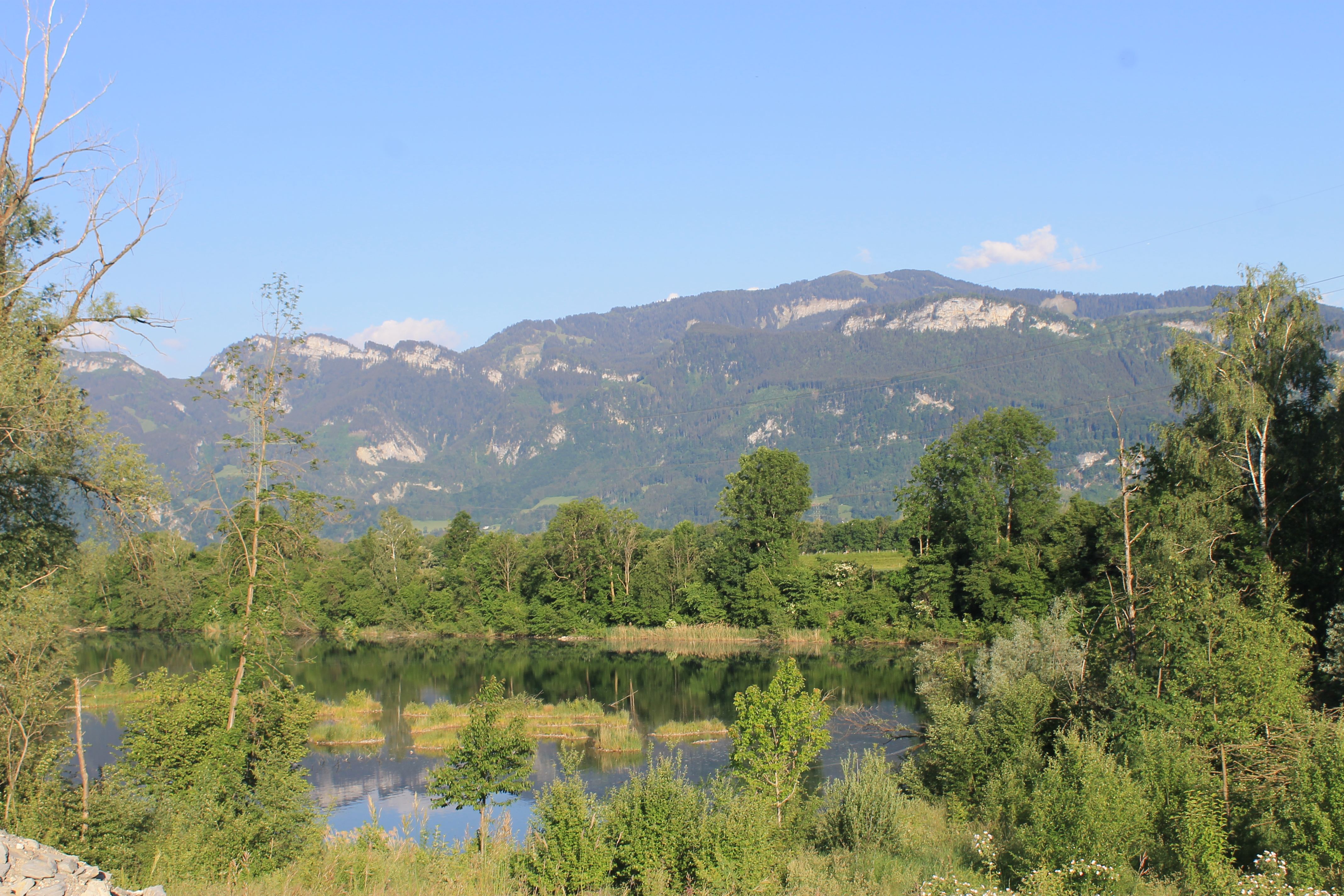 Grenze wischen Vorarlberg und der Schweiz